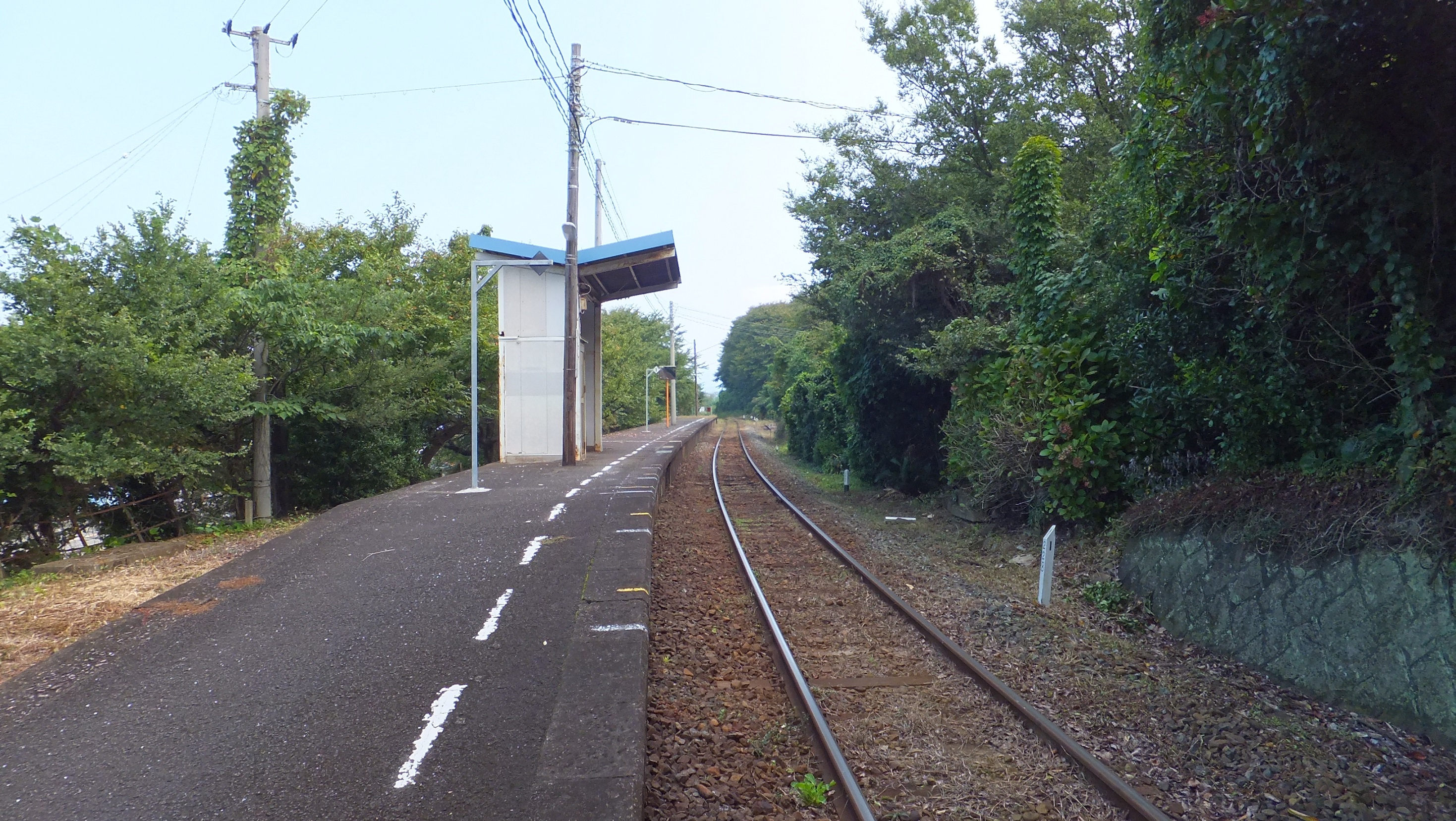 JR予讃線（愛ある伊予灘線）喜多灘駅